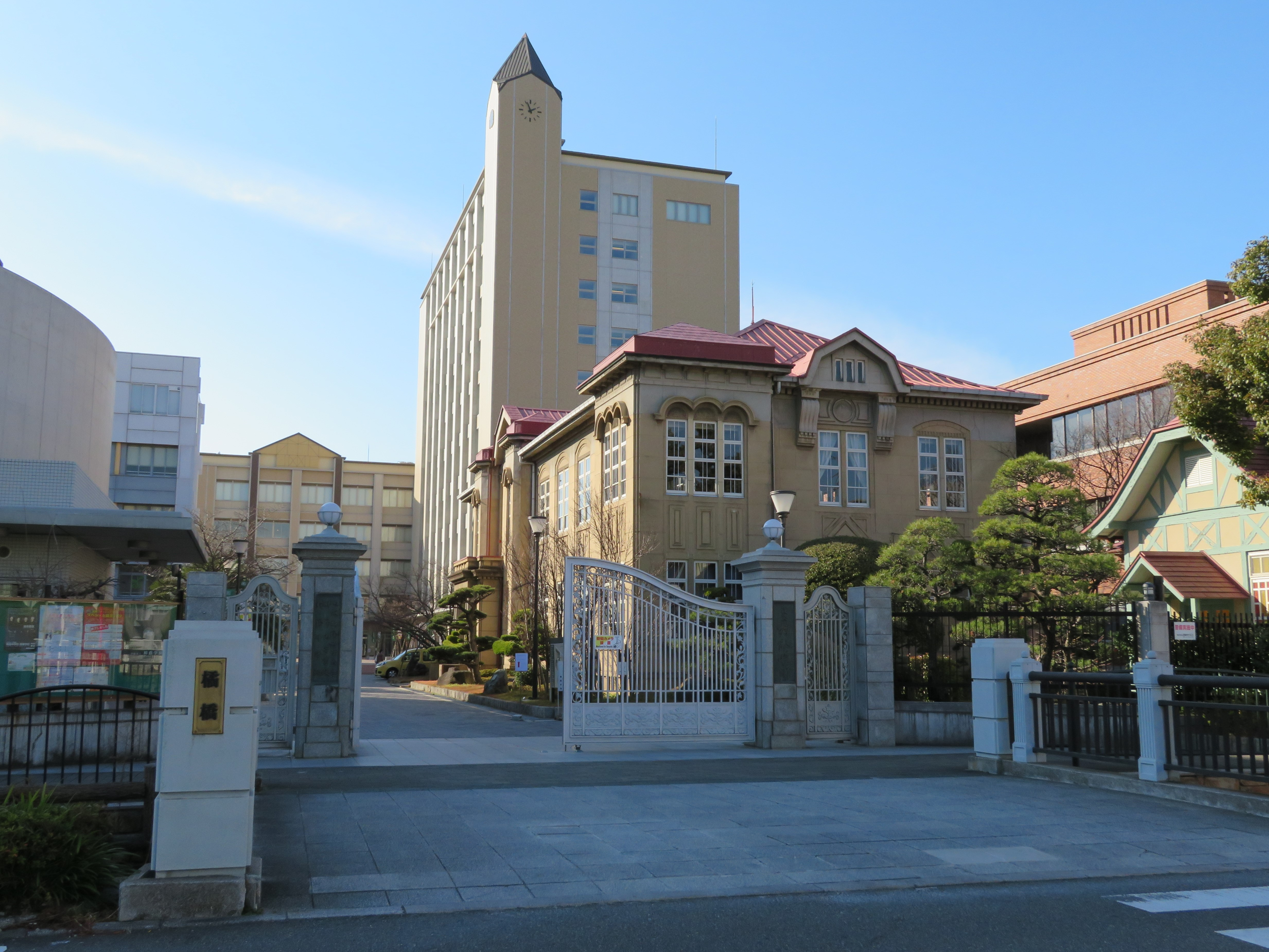 大阪樟蔭女子大学正門